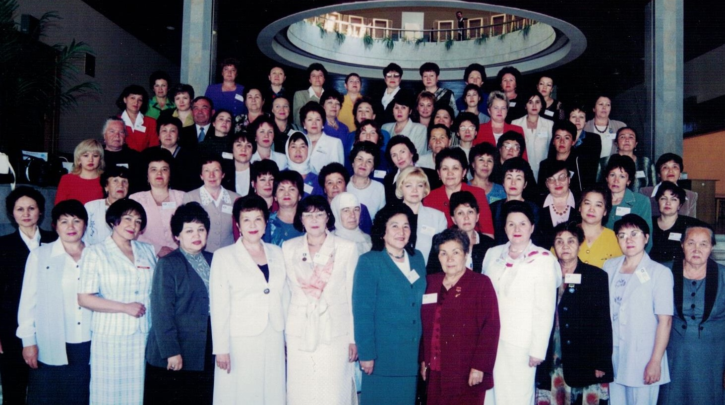 Делегатки Второго Всемирного курултая башкир